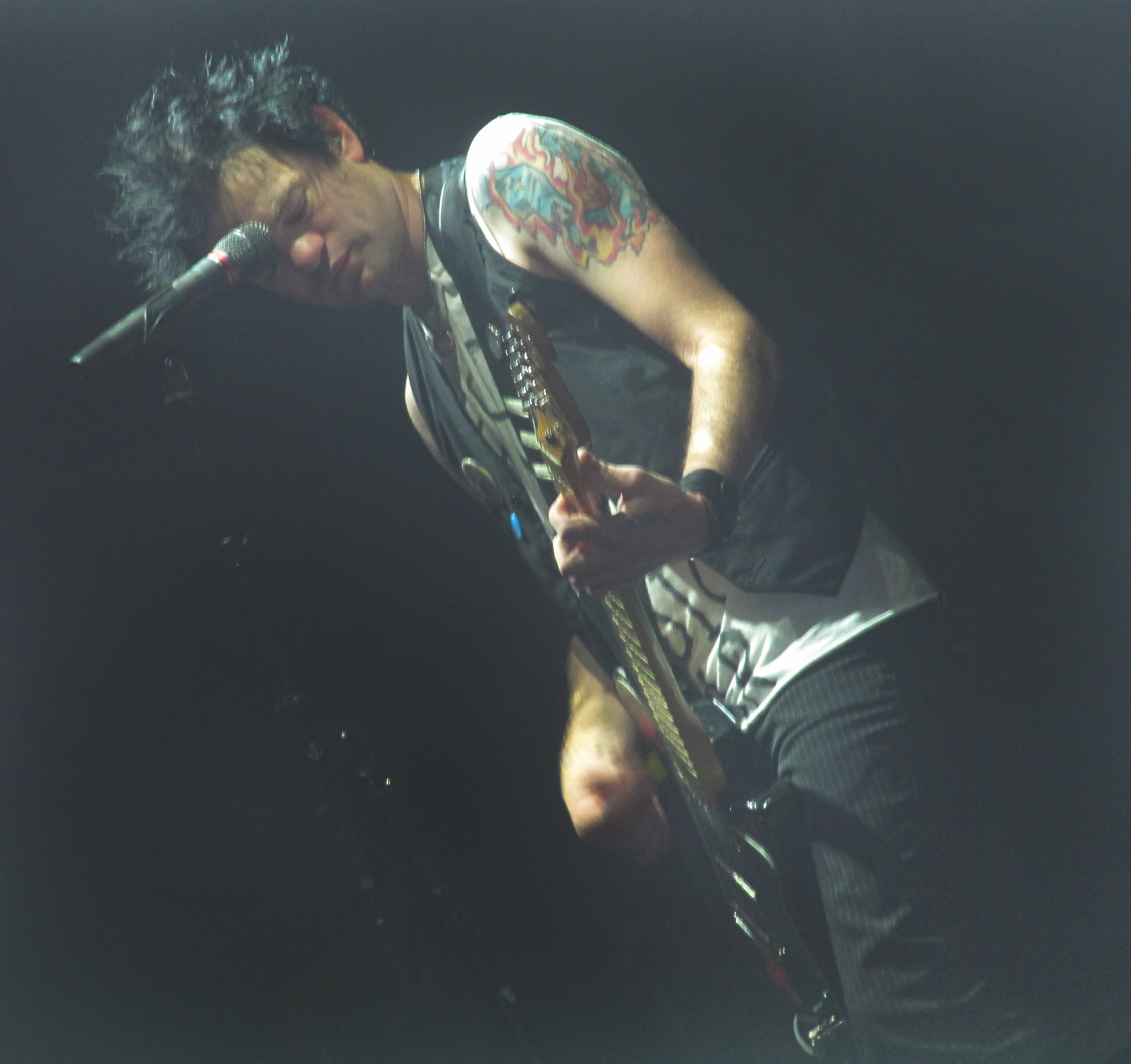 Sum 41 в Москве